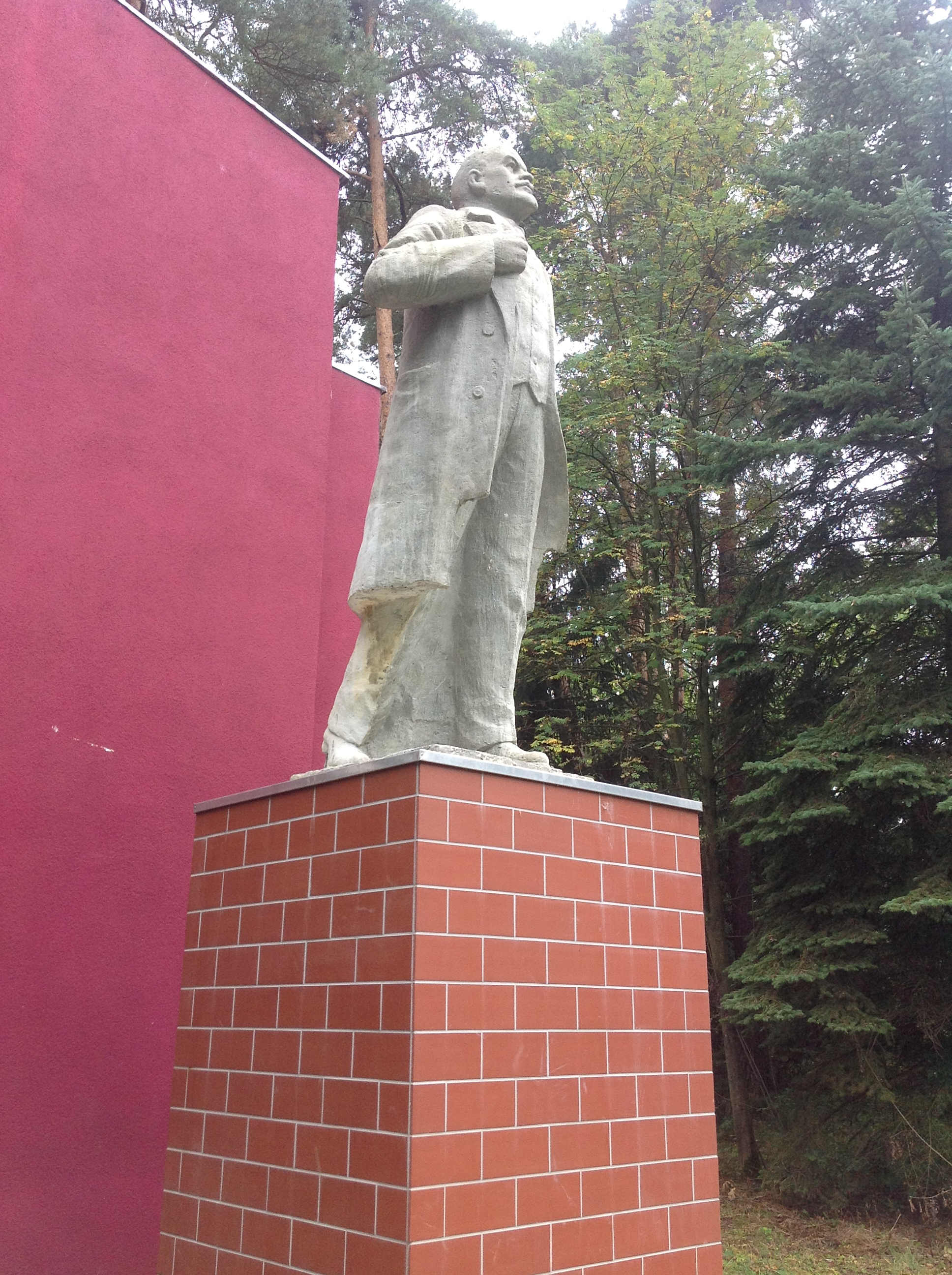 Nohra - GSSD-Kaserne Leninstatue, Führungsstandort Stab 8. Gardearmee.